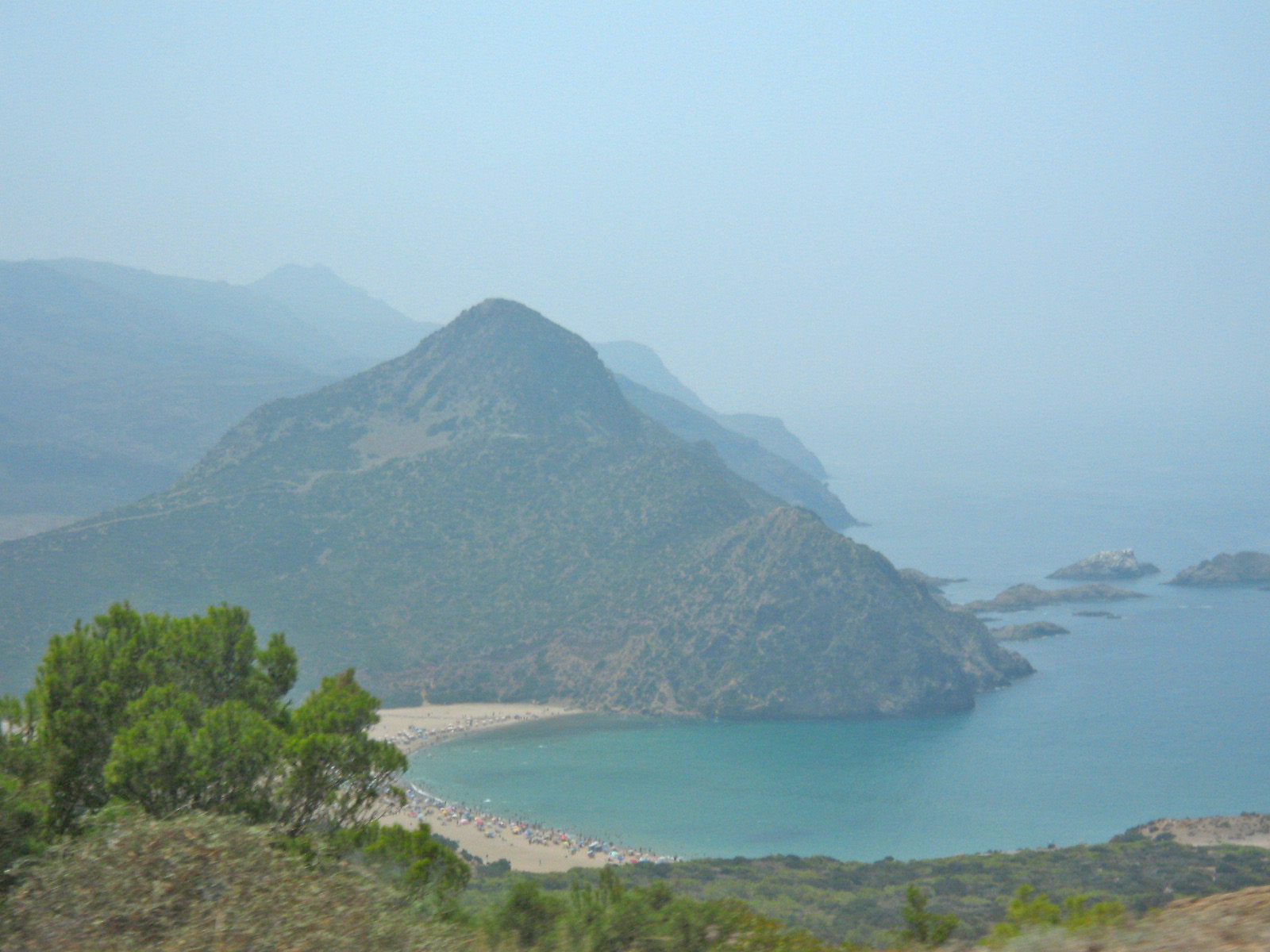 Vu de la plage de Madagh (Au delà de la pointe se trouve la plage Madagh 2)